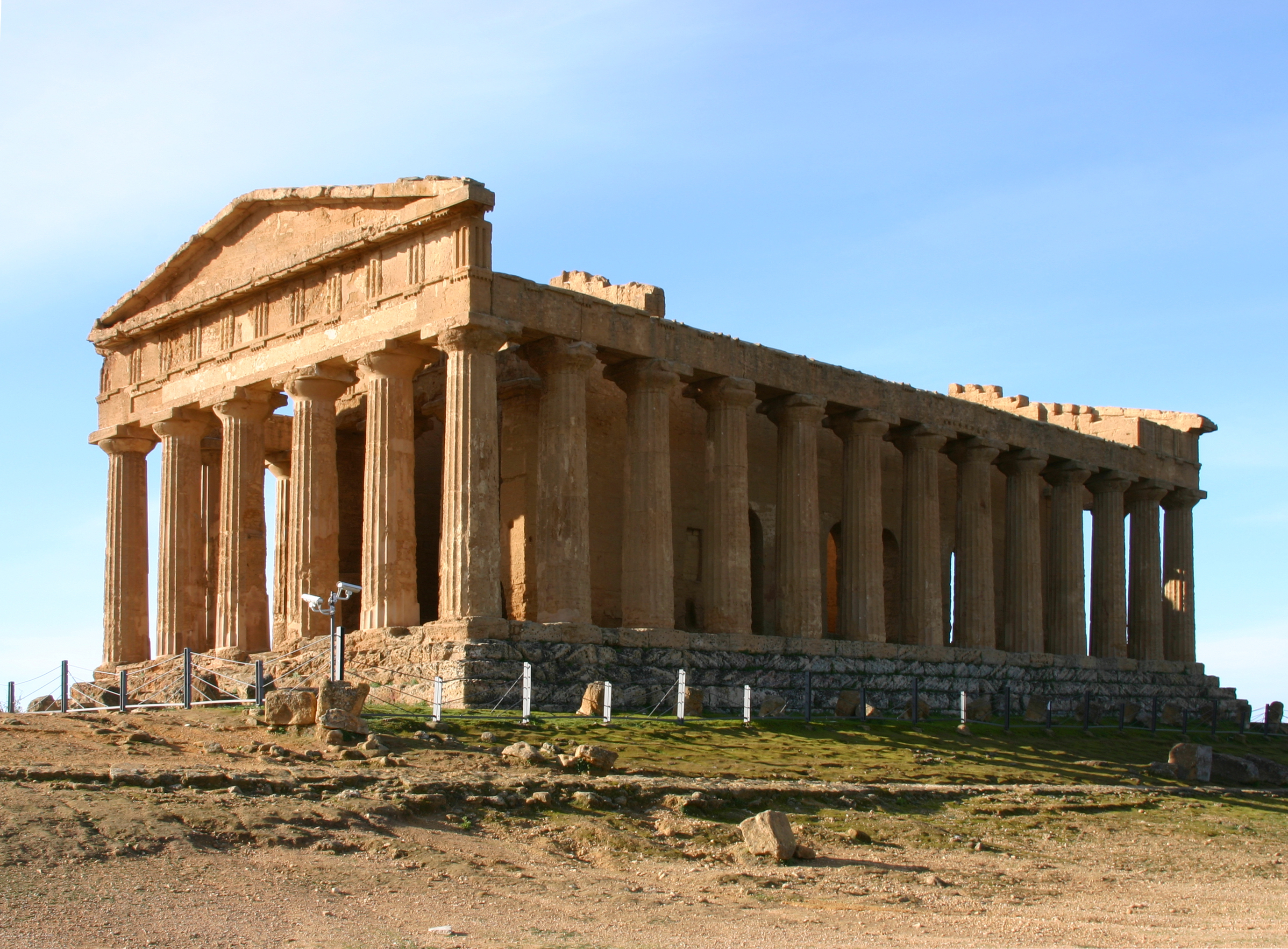 emple of Concordia